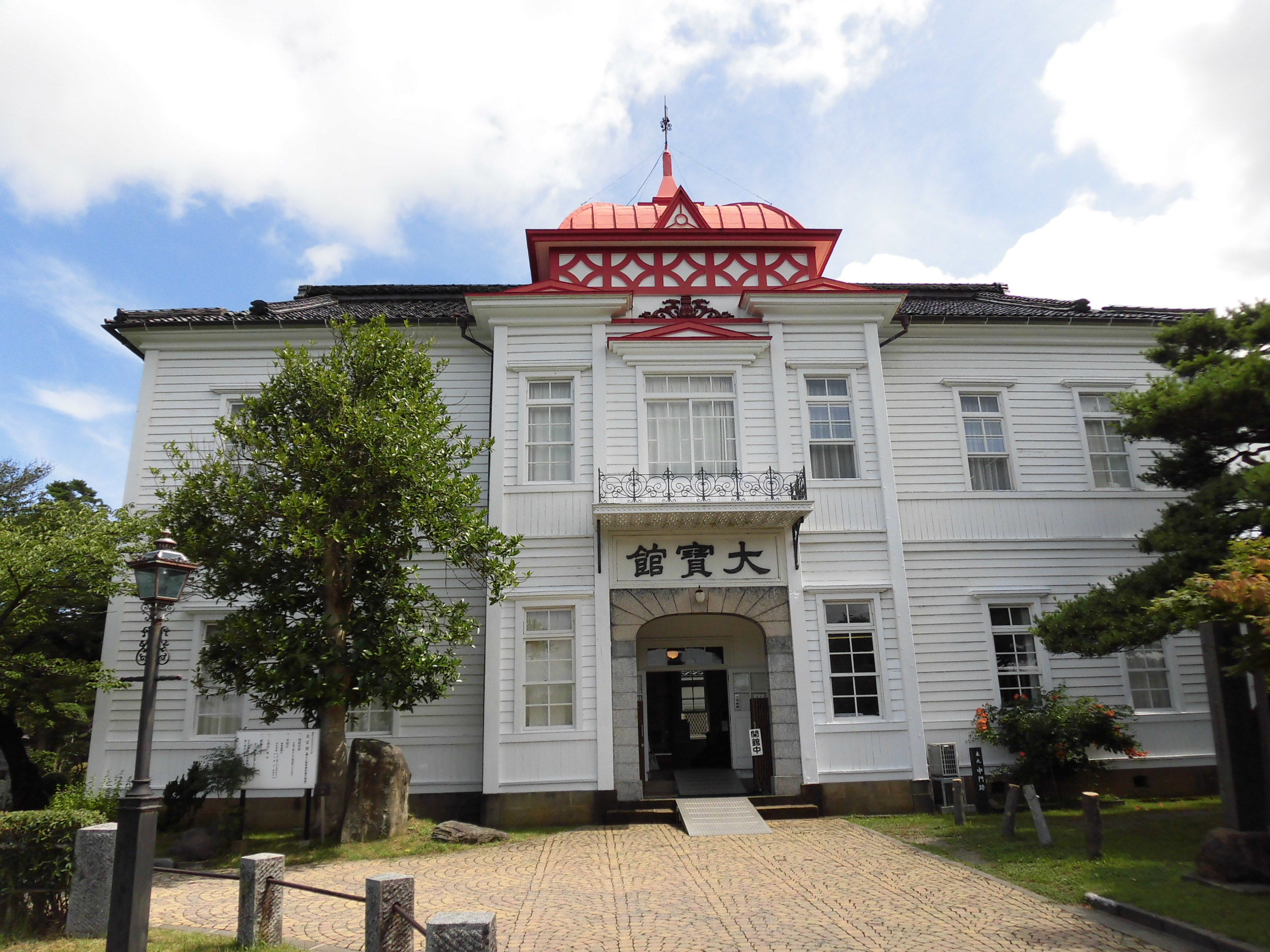 大宝館。山形県鶴岡市の鶴岡公園内に所在。大正4年（1915年）完成。鶴岡市指定有形文化財。現在は鶴岡市の郷土人物資料展示施設。旧・鶴岡市立図書館。